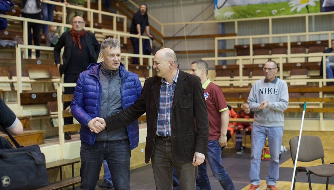 Stargard 23.04.2017r. Prezes Spójni Stargard Tadeusz Gutowski po meczu z GKS Tychy przyjmuje gratulacje